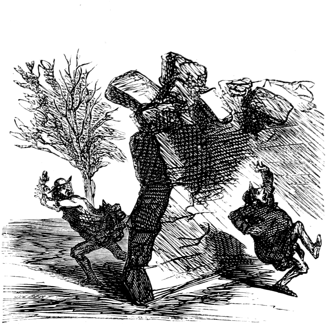 Si le mur mitoyen n’est pas en état de supporter l’exhaussement, celui qui veut l’exhausser doit le faire reconstruire à ses frais. La loi ne dit pas lequel des deux propriétaires le recevra sur la tête lorsqu’il viendra à tomber.